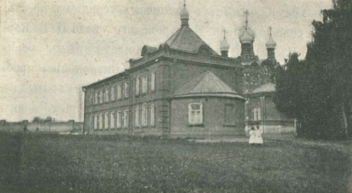 Больничная церковь во имя мученицы Акилины Казанского Головинского монастыря в 1912 году